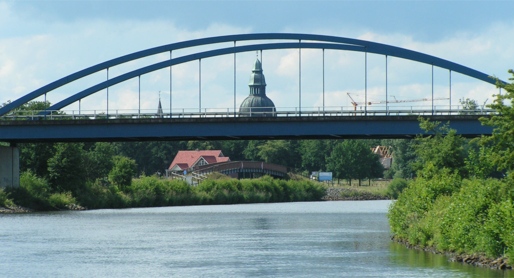 Emsbrücke in Haren